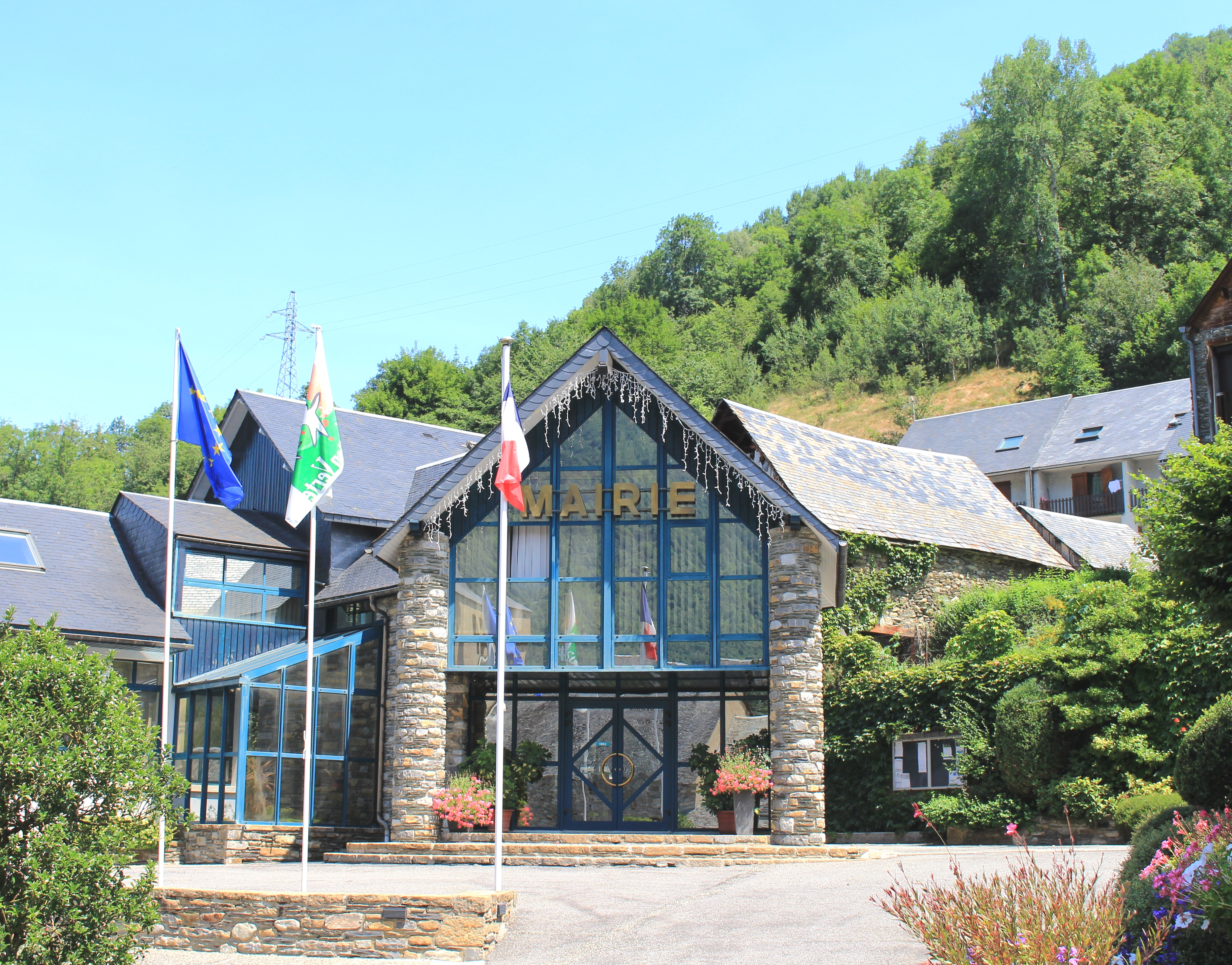 Mairie de Loudenvielle (Hautes-Pyrénées)